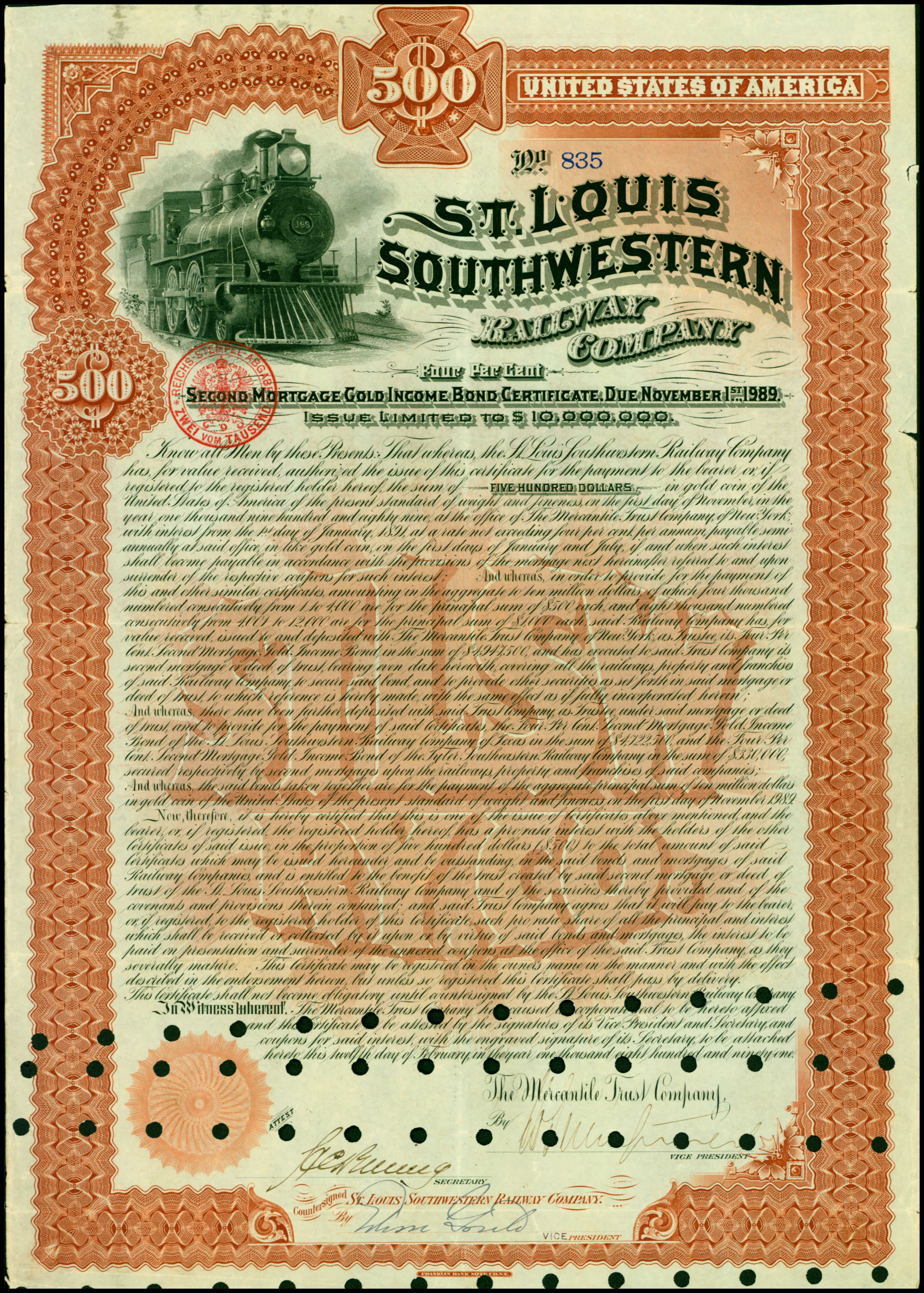 Anleihe der St. Louis Southwestern Railway Company vom 12. Februar 1891